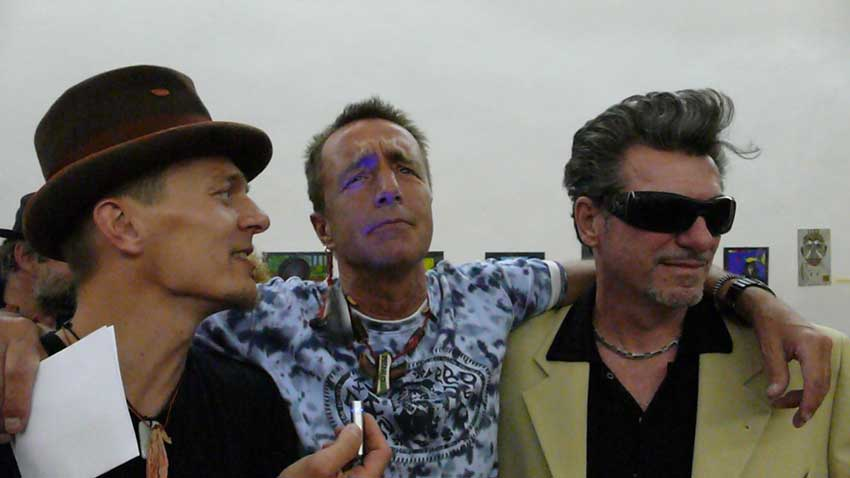 Baksa-Soós Attila, Baksa-Soós János és Méhes Lóránt. Székesfehérvár, Szent István Múzeum.